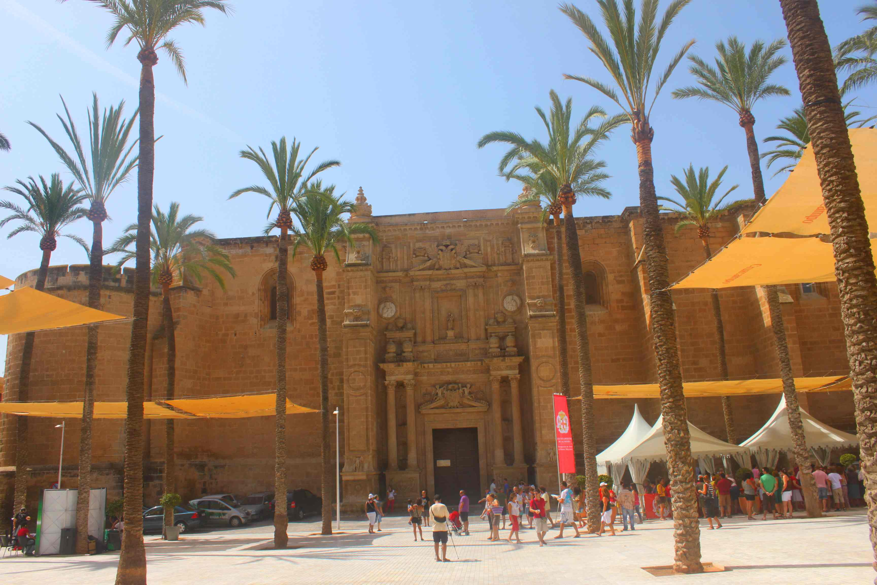 Die Kathedrale, Plaza de la Catedral. Sie ist festungsartig gebaut und diente der Bevölkerung auch als Zufluchtsort bei Überfällen und Plünderungen durch Piraten aus Nordafrika.